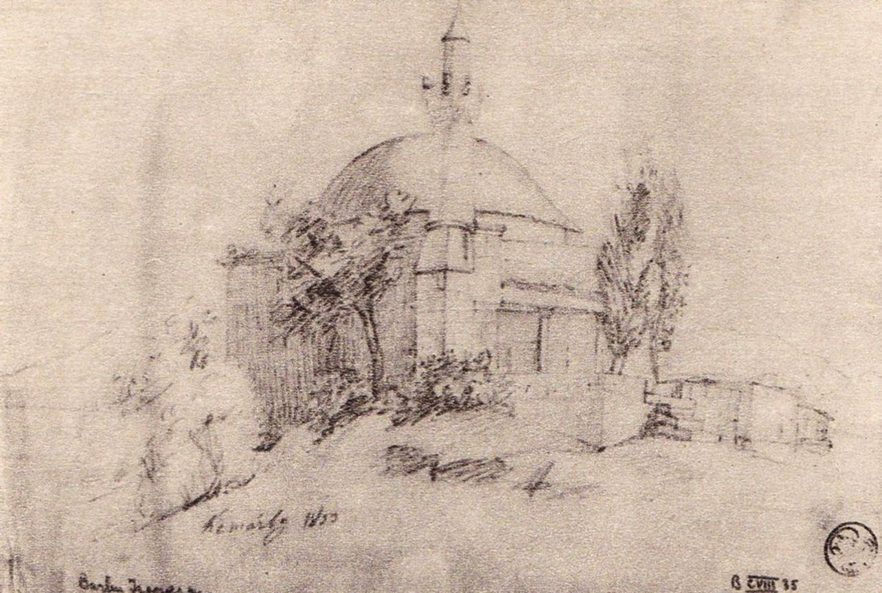 Peisaj din Kemarly